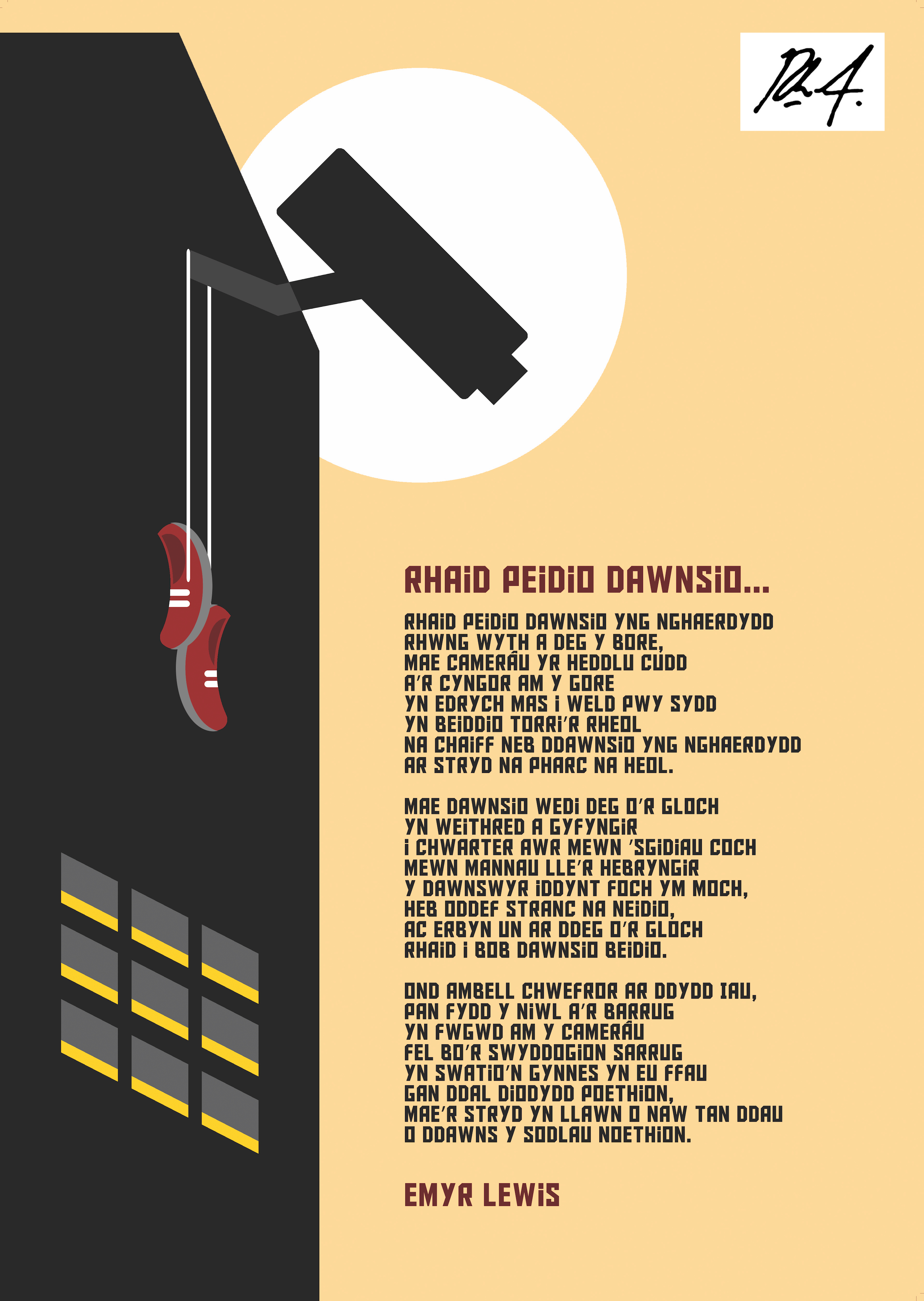 Poster Rhys Aneurin o'r gerdd "Rhaid Peidio Dawnsio" gan Emyr Lewis